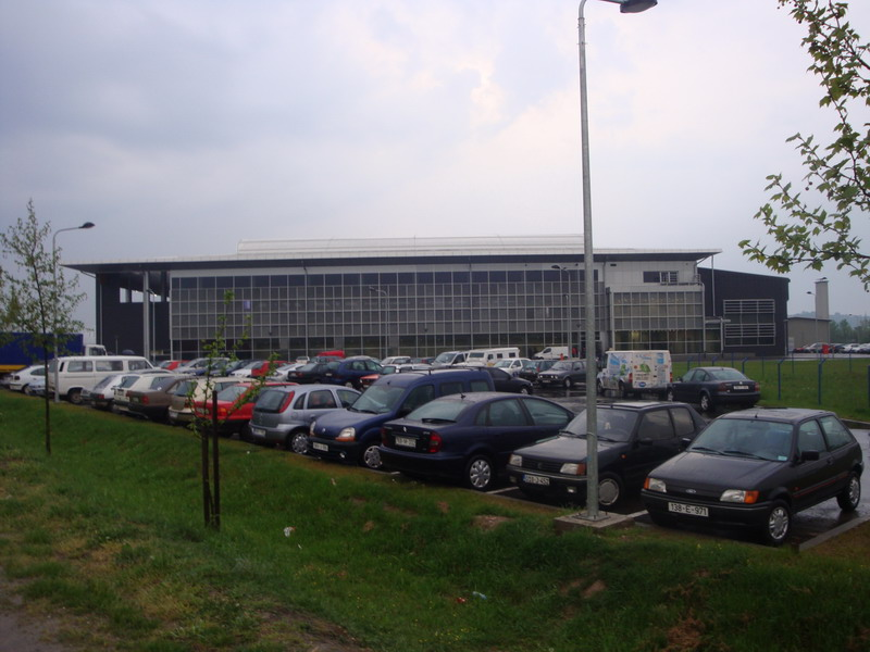 Спортска_дворана_у_Лакташима